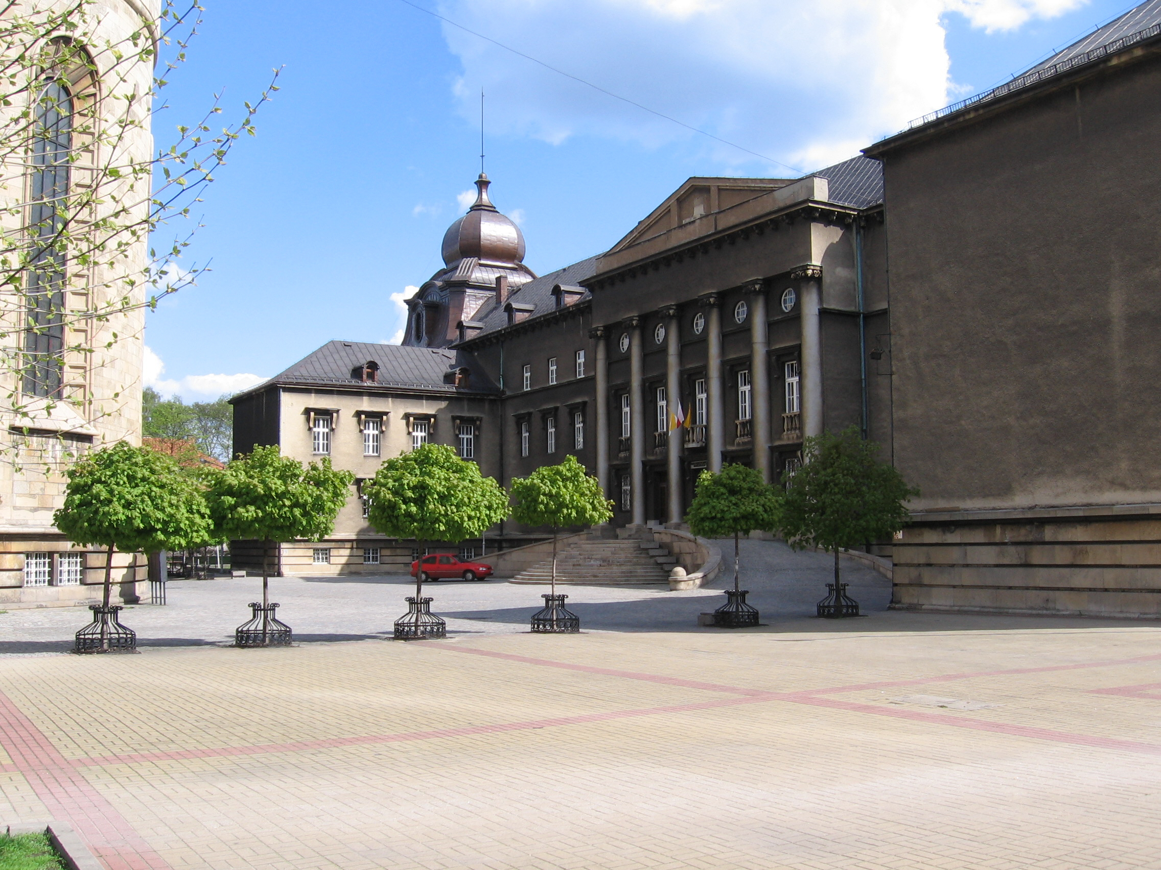 Gmach kurii archidiecezji katowickiej, od frontu